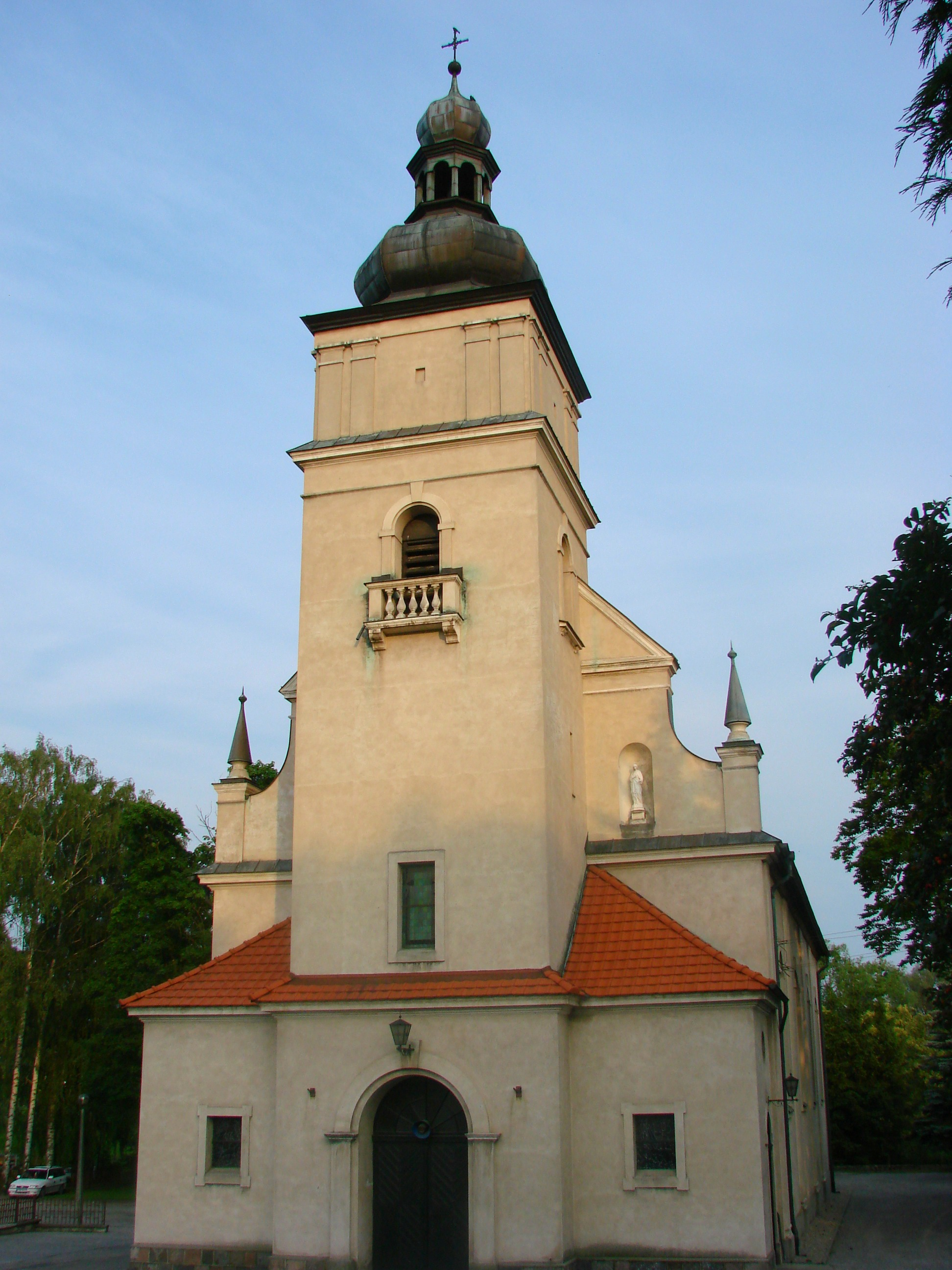 Kościół Parafialny pod wezwaniem Św. Bartłomieja Apostoła, na Starym Mieście; przy ul. Farnej. Obiect in Sępólno Krajeńskie, Poland.